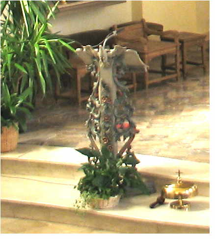 Sujet: Ambo an der Kierch zu Rëmerschen.